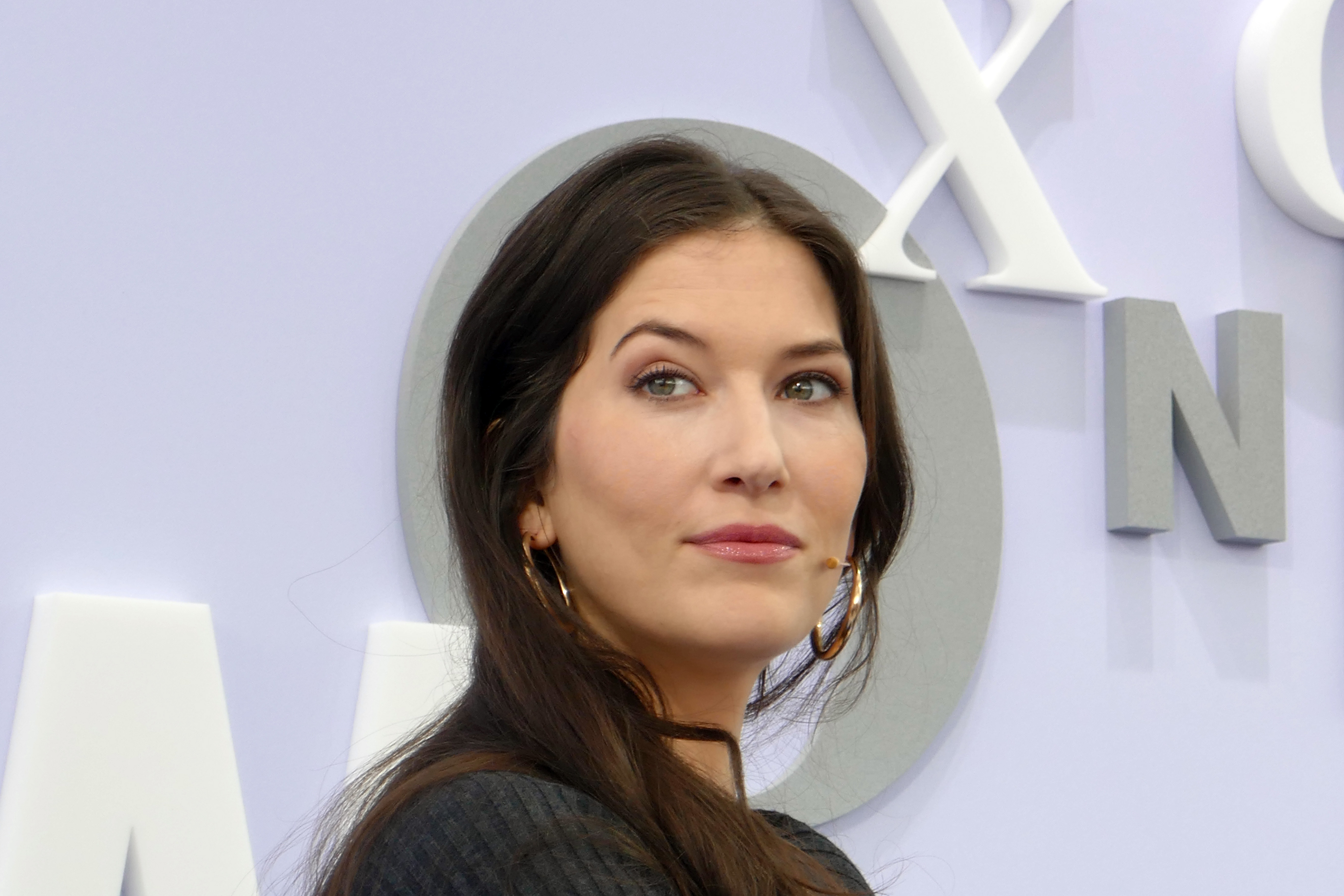 La romancière allemande Antonia Baum présentant son dernier ouvrage Stillleben lors de la Foire du Livre de Leipzig 2018.